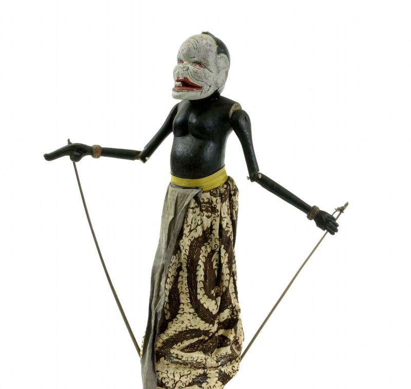 Stokpop. Houten wajang golèk pop, voorstellend de Semar, de vader van de drie panakawans, Gareng, Petruk en Bagong. De pop maakt deel uit van een collectie Javaanse wajang figuren (8-64 t/m 8-116). Het hoofd van de pop is monsterachtig. De hoofdpen en de staafjes in de hand zijn vervaardigd van bamboe.. Houten wajangpop, voorstellend Semar Unknown language: Wayang Golèk Purwa